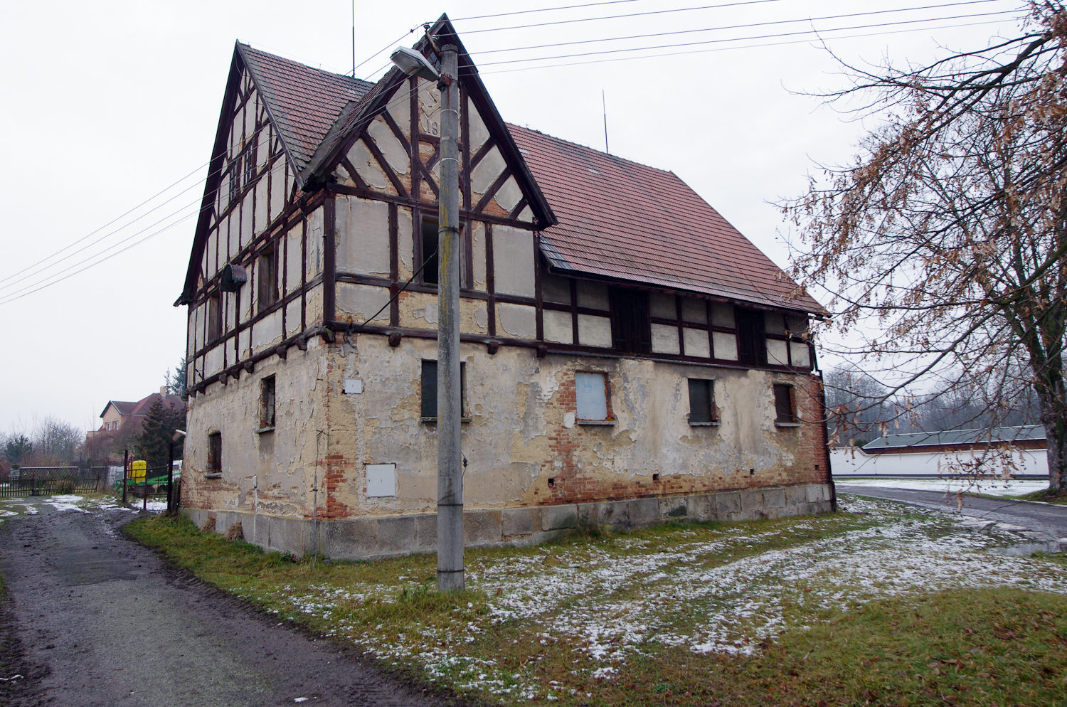 Liboc, okres Sokolov, hrázděný dům